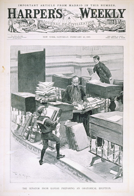 „The Senator from Kansas Preparing an Oratorical Eruption“, Cartoon eines unbekannten Künstlers nach einer Vorlage von William Allen Rogers. – Senator from Kansas: William A. Peffer.